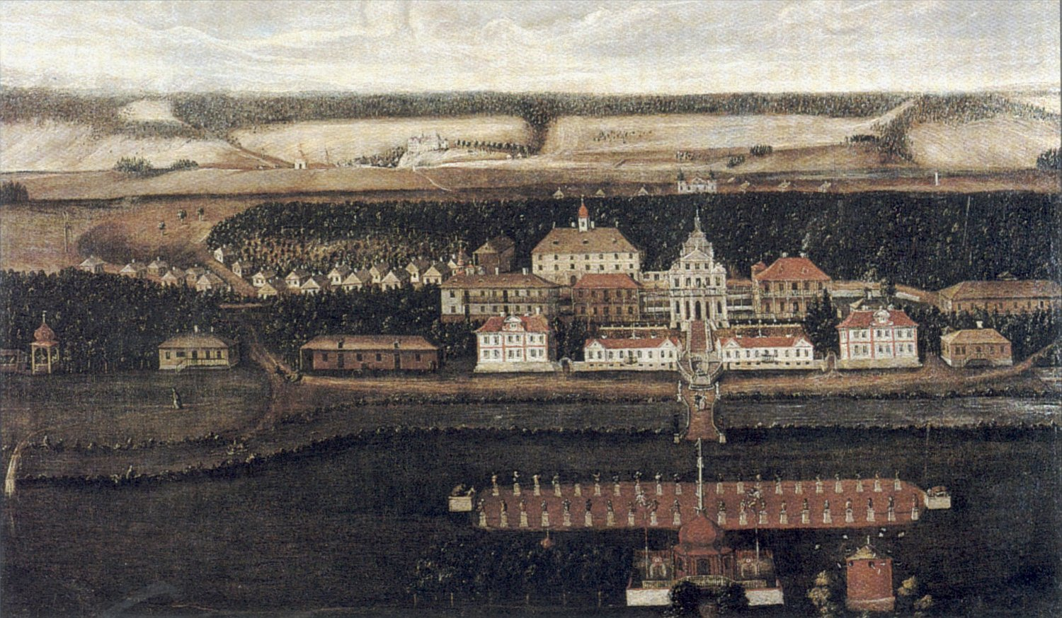 Zámek a lázně v Kuksu, pohled od špitálu, mezi lety 1720-1729, olej na plátně, ze sbírek špitálu v Kuksu